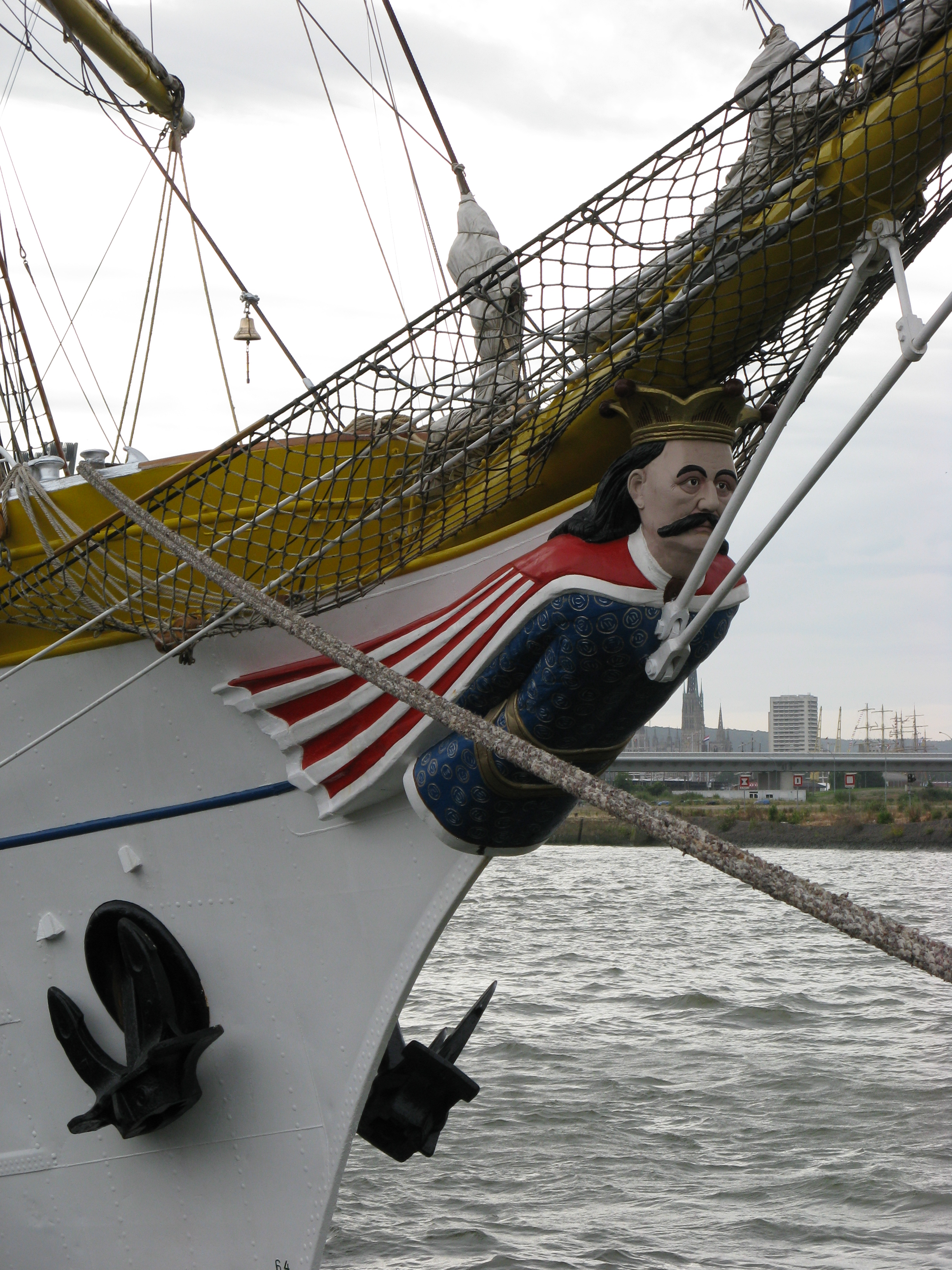 Armada Rouen 2008. Mircea - Figure de proue